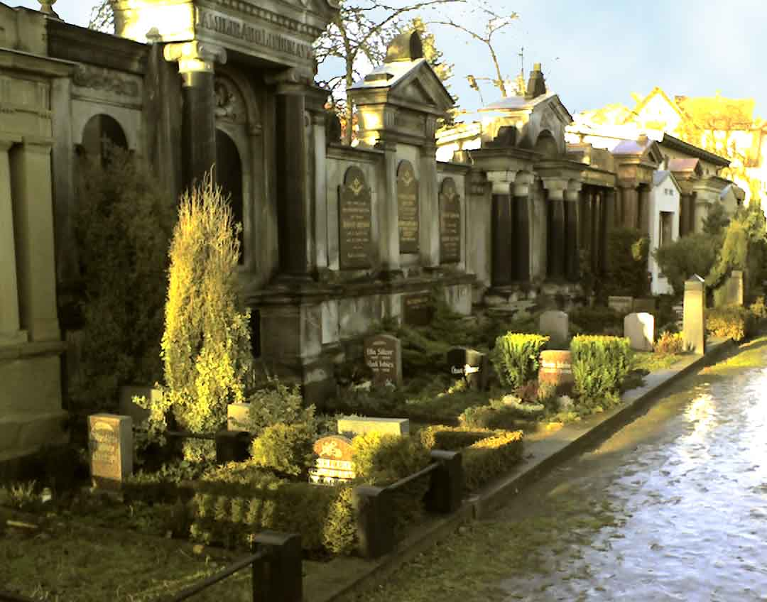 Erbbegräbniswand auf dem Friedhof Pankow IV (Niederschönhausen)